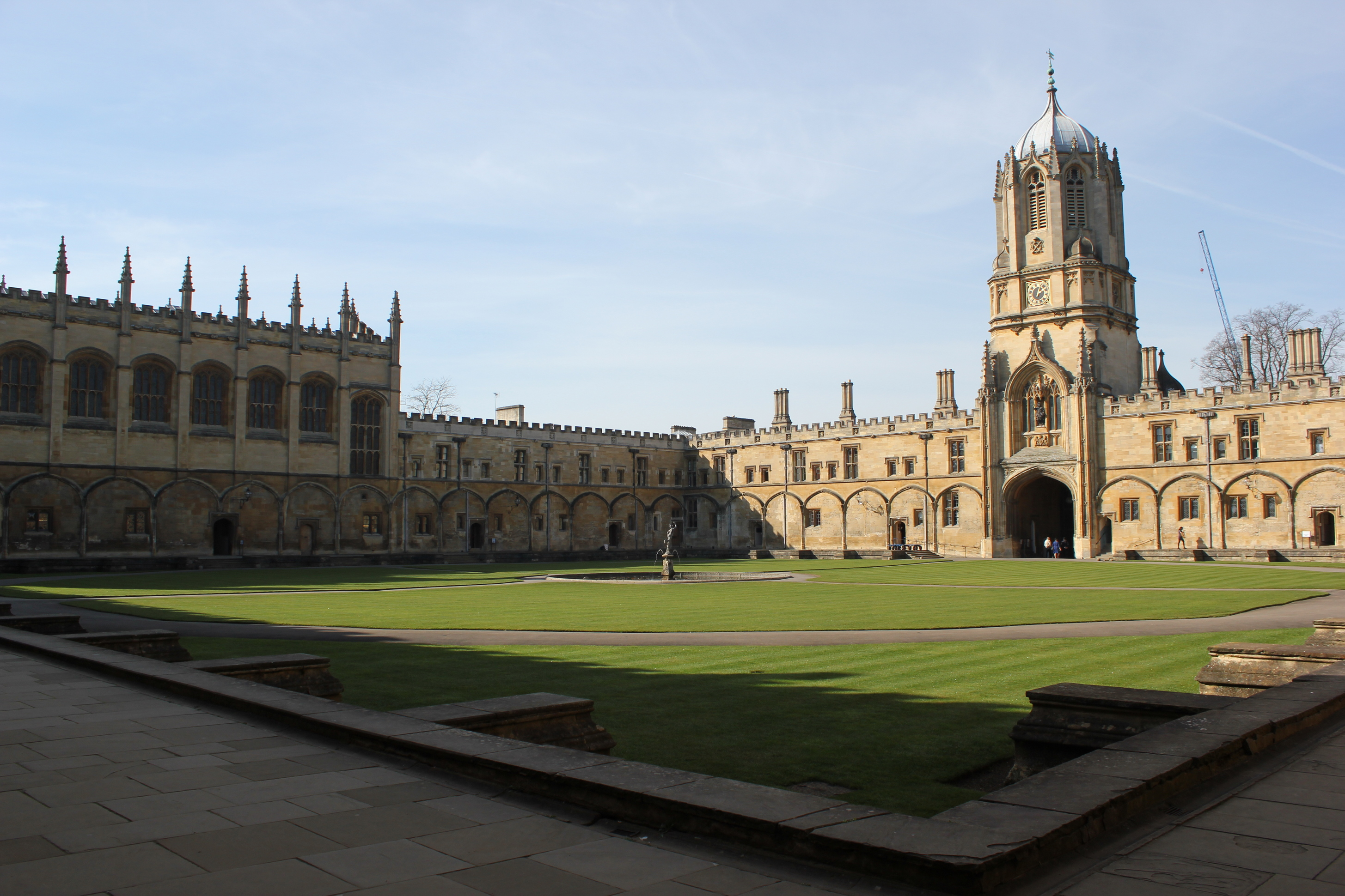 Der Hof des Christchurch College in Oxford, England.